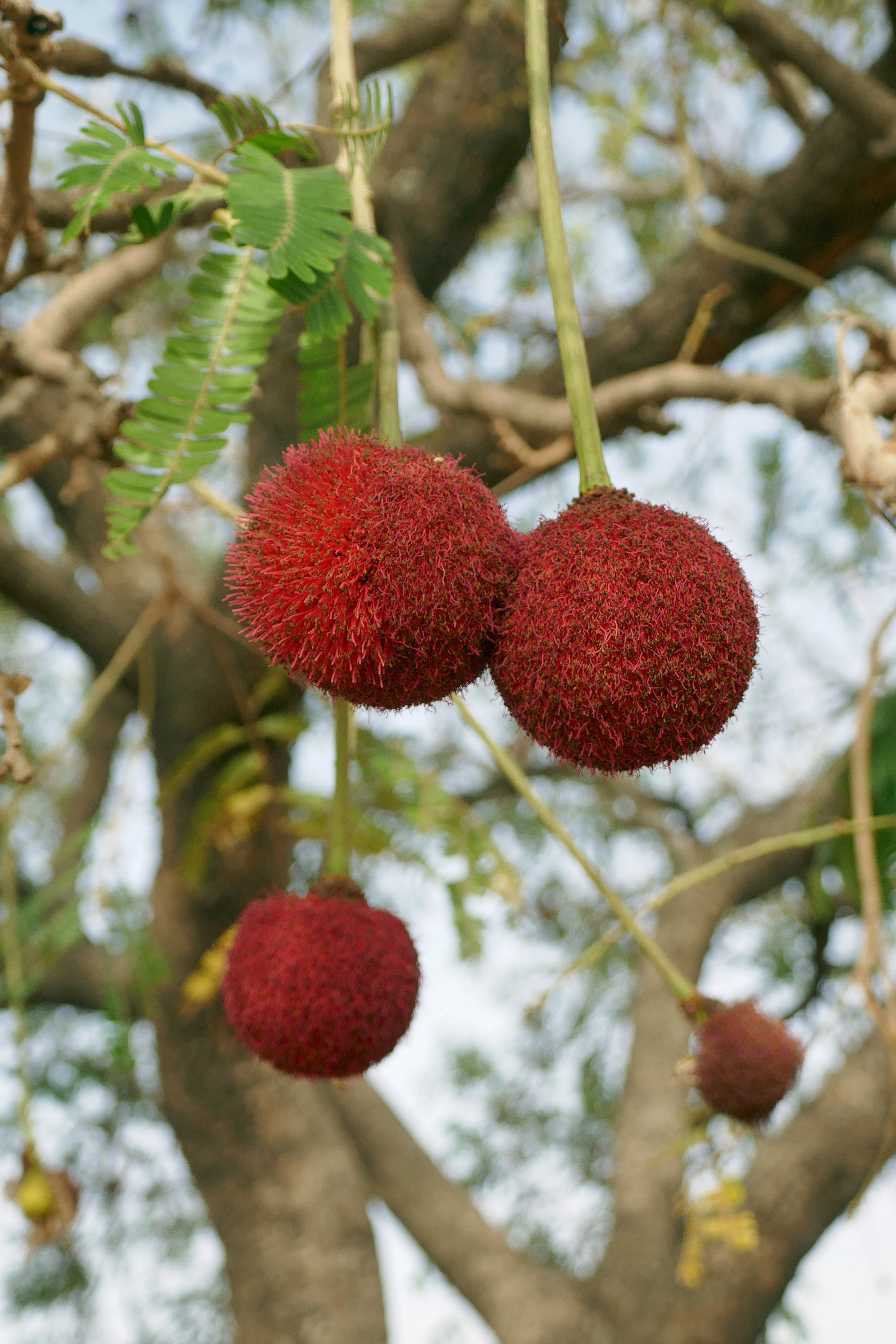 Parkia biglobosa dans l'Atakora (nord-ouest du Bénin).